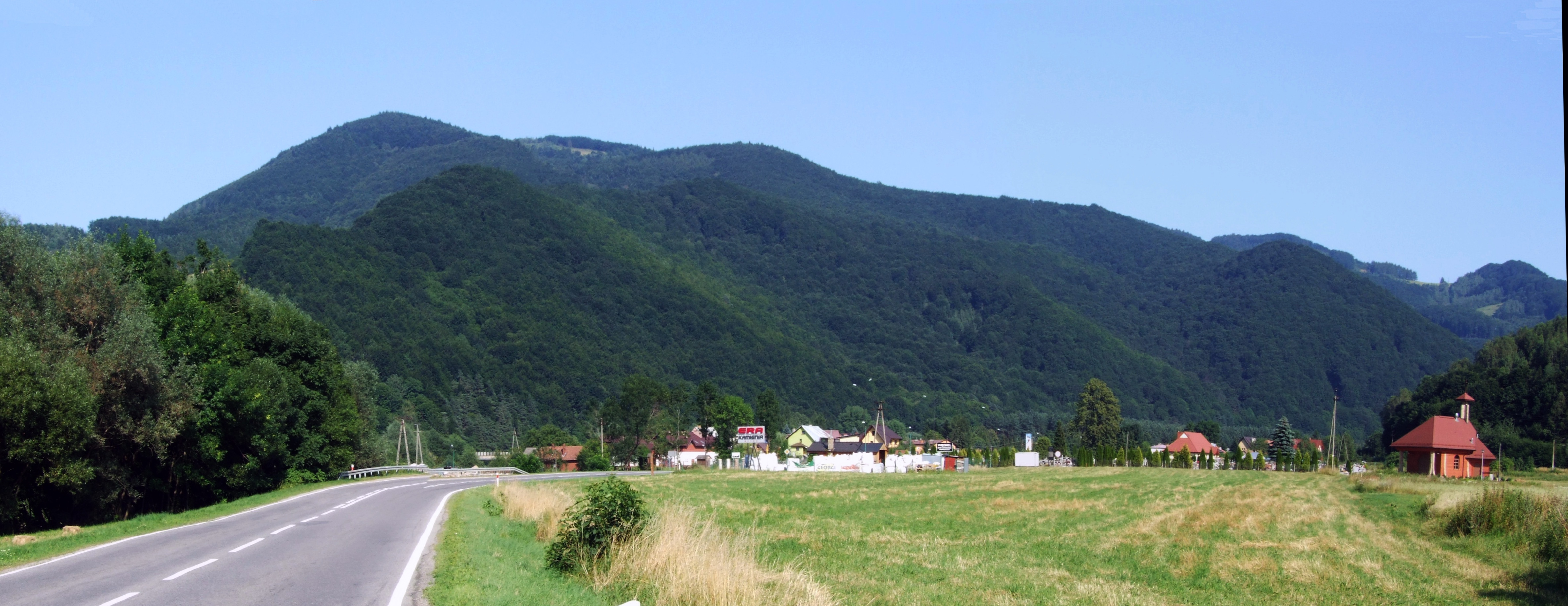 Widok od północy na Rytro i Makowicę